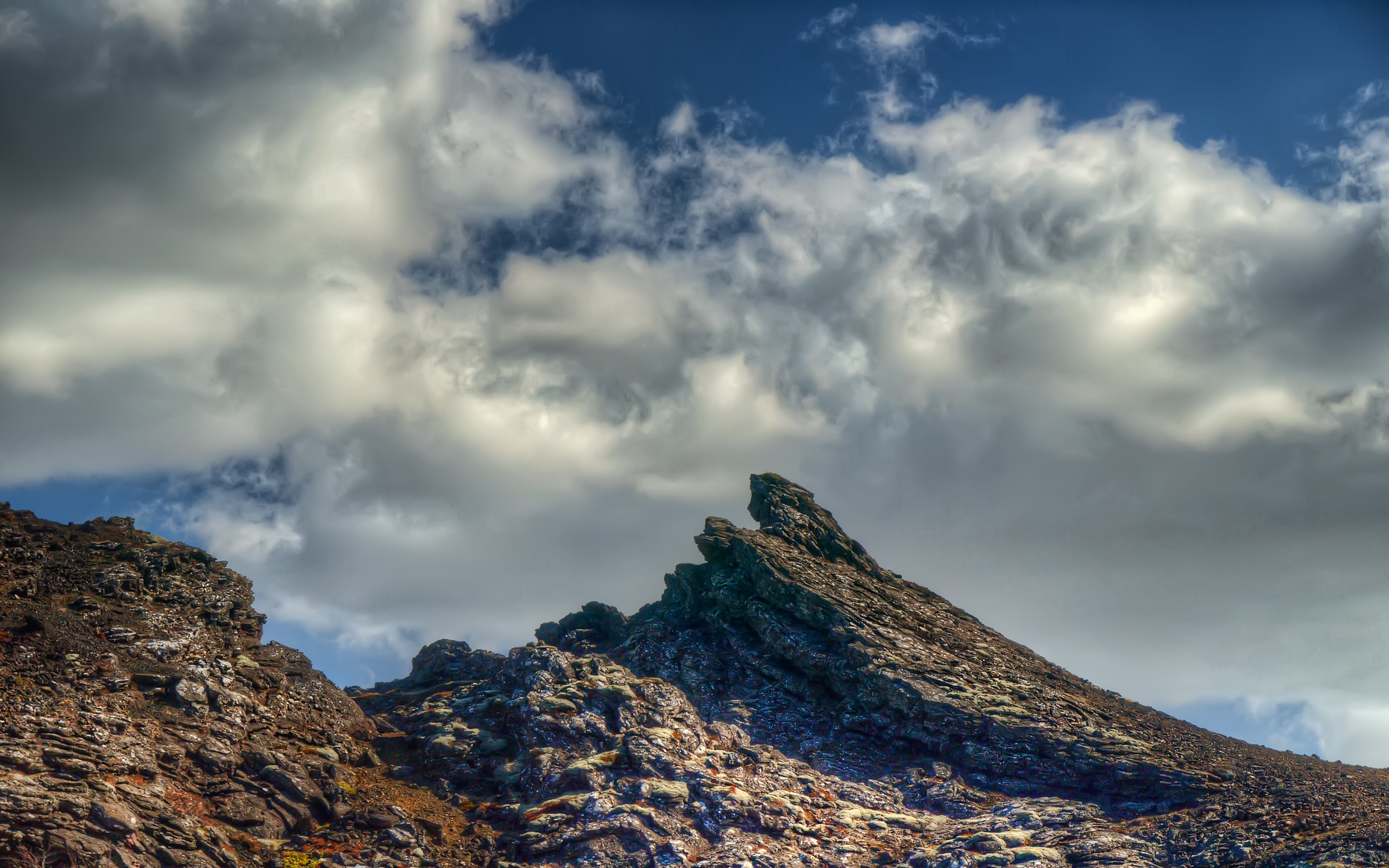 Búrfell 1